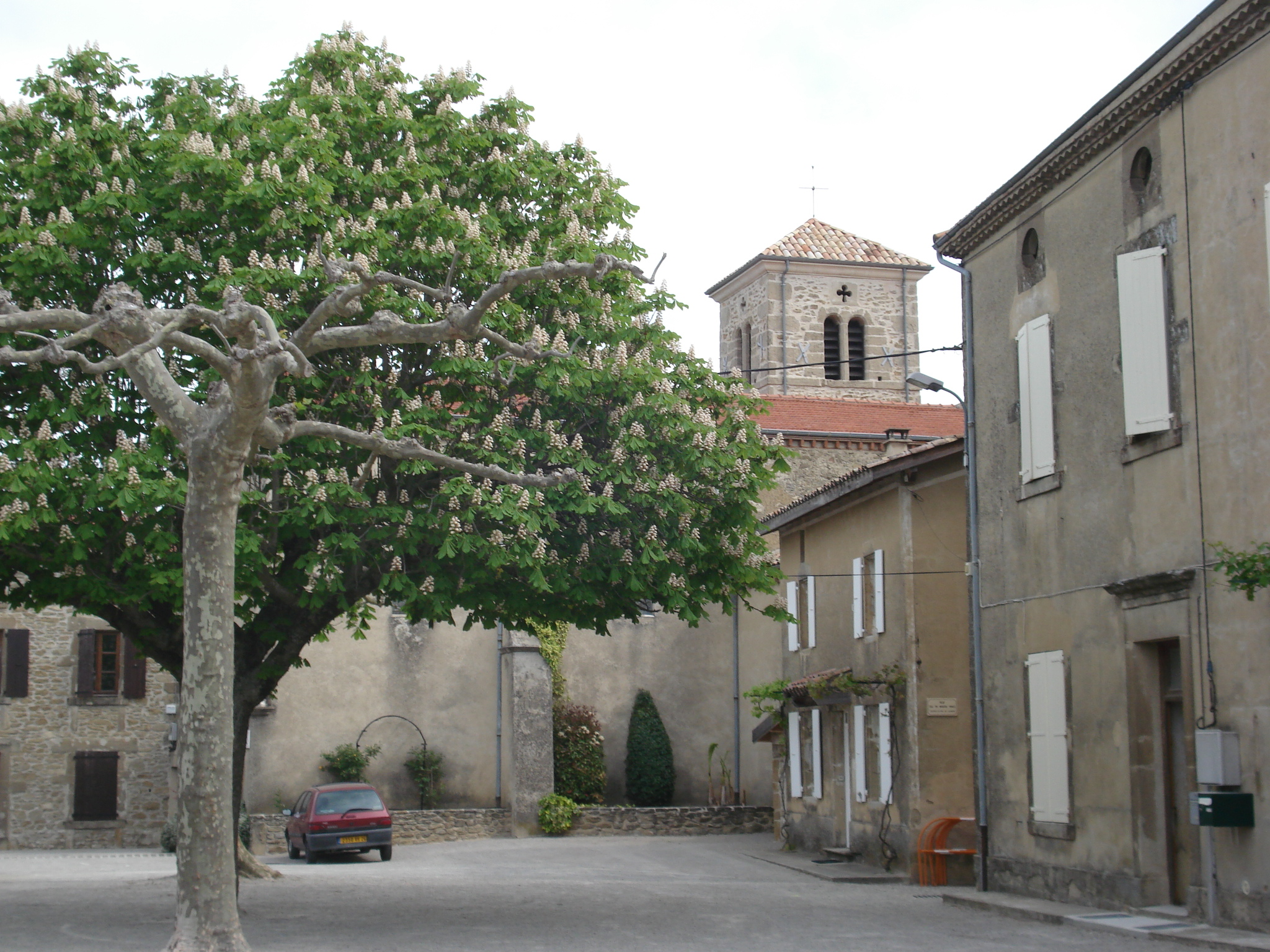 village de Ratières dans la Drôme des collines